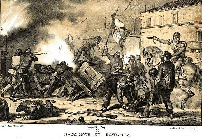 disegno scontri a Catania nel 1849